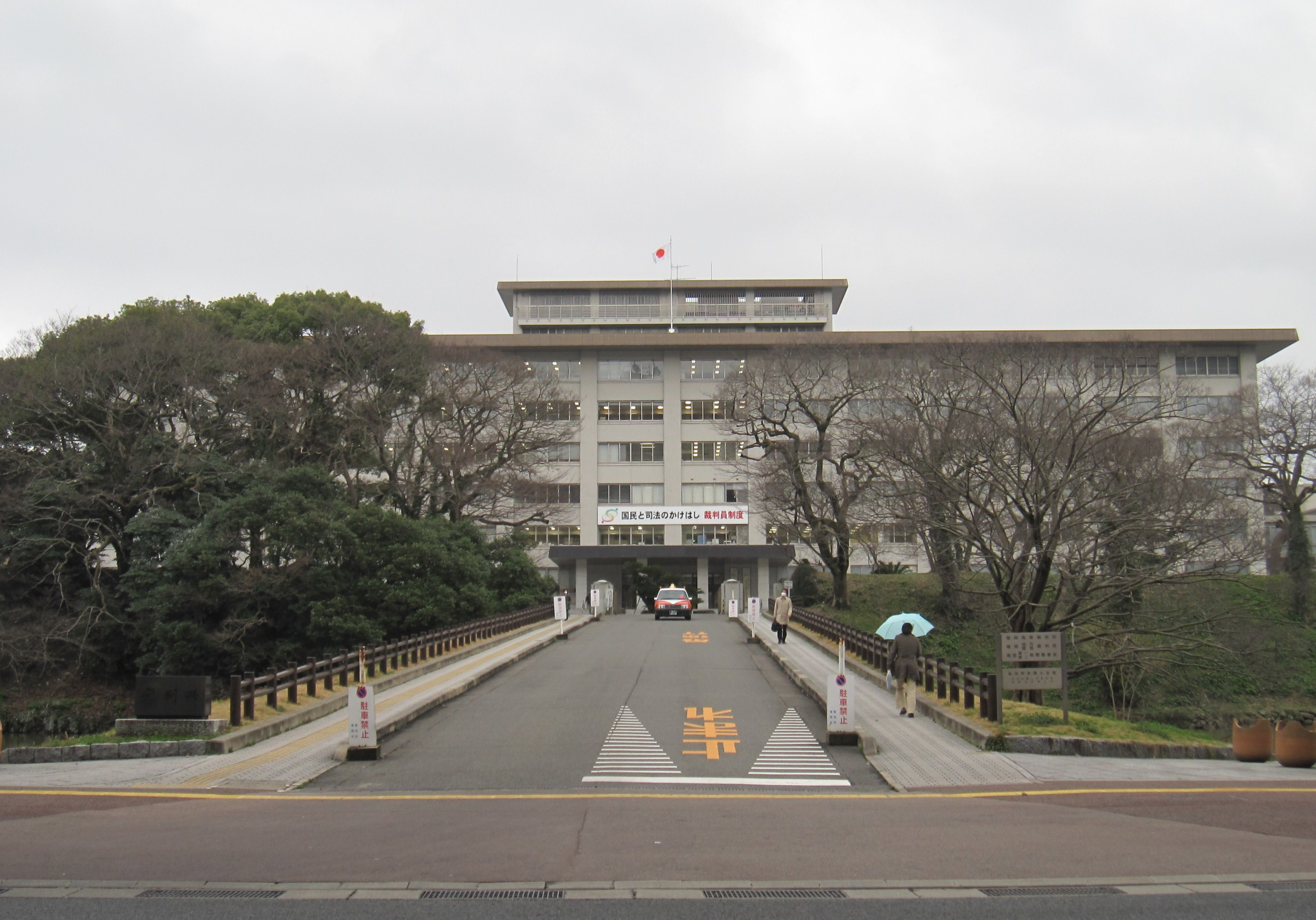 福岡高等裁判所・福岡地方裁判所